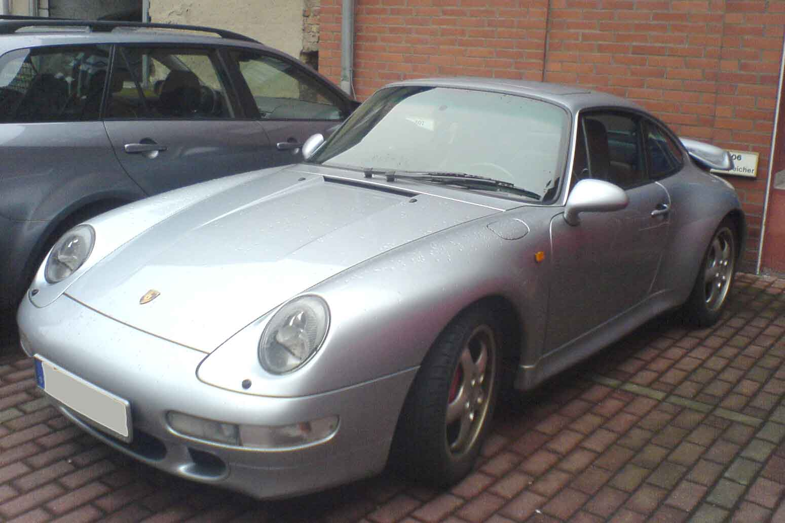 Porsche 993 Turbo